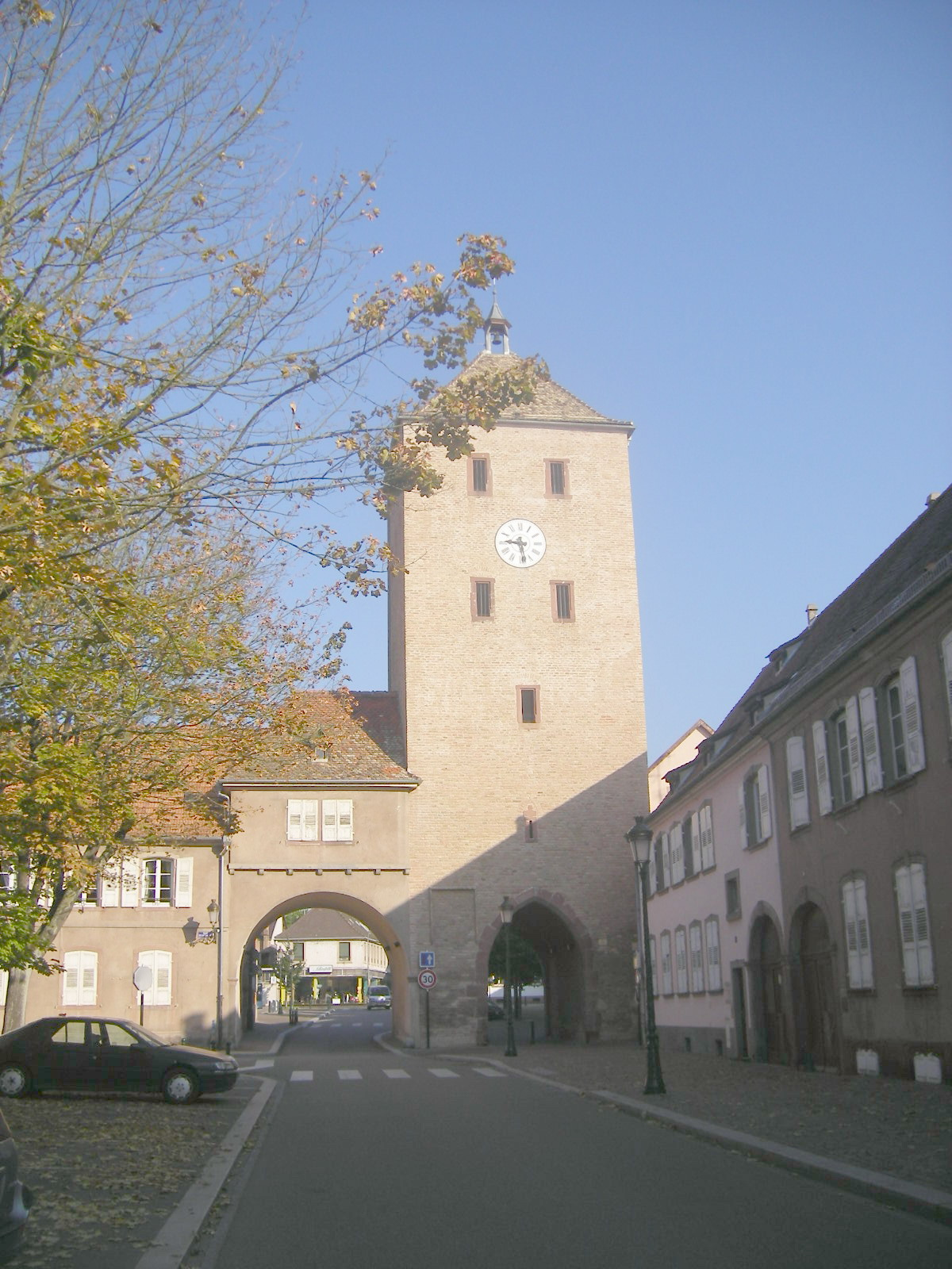 Haguenau (Bas-Rhin)